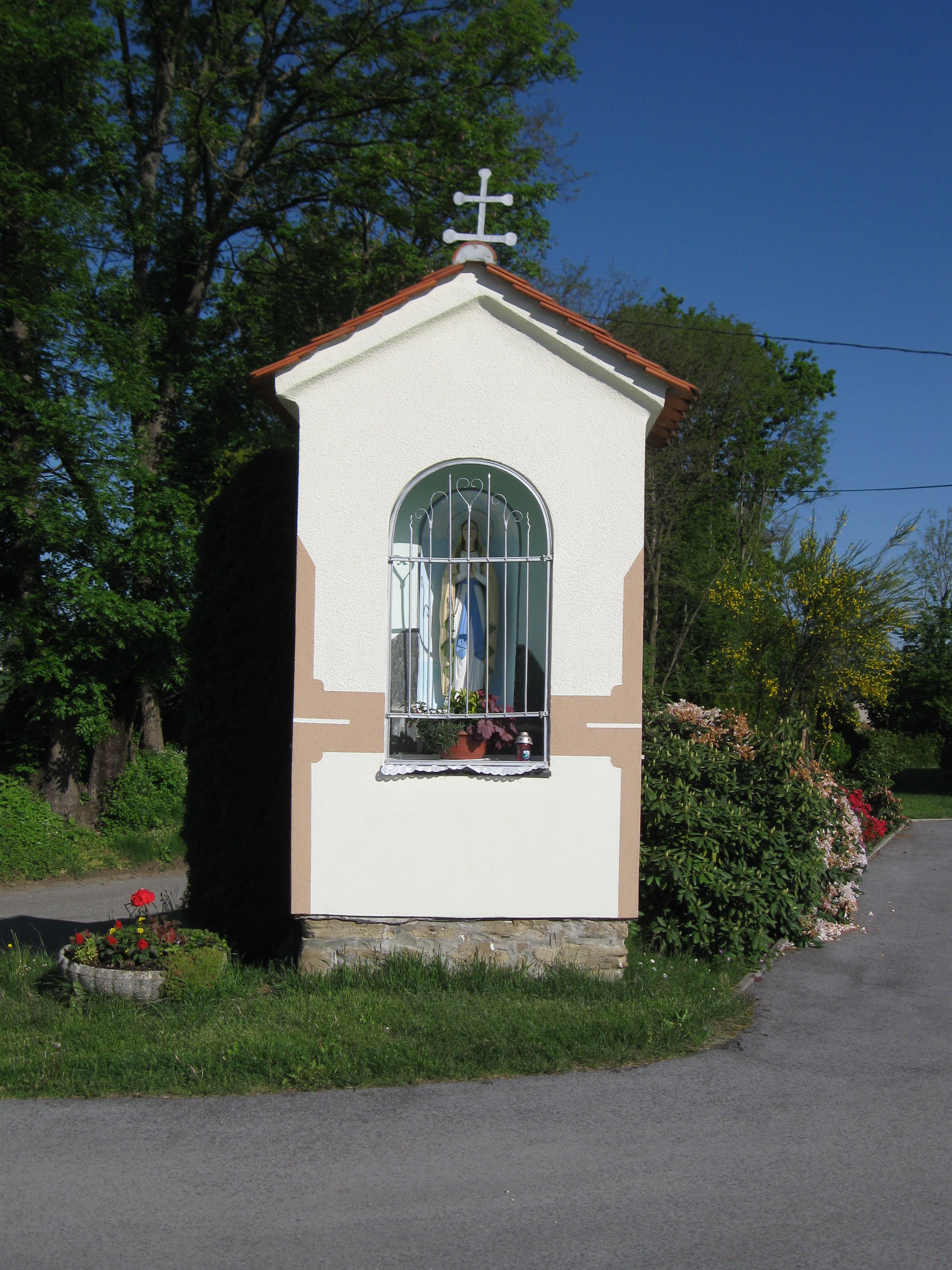 Znamenje zgrajeno v 19. stol. stoji ob hiši Boračeva 16a. Vpisana v register nepremične kulturne dediščine pod št. 14027